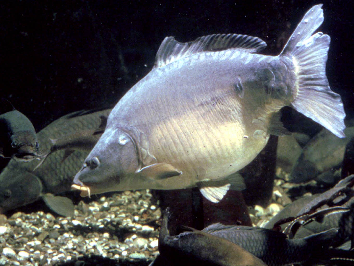 Musée du Léman. Les aquariums.